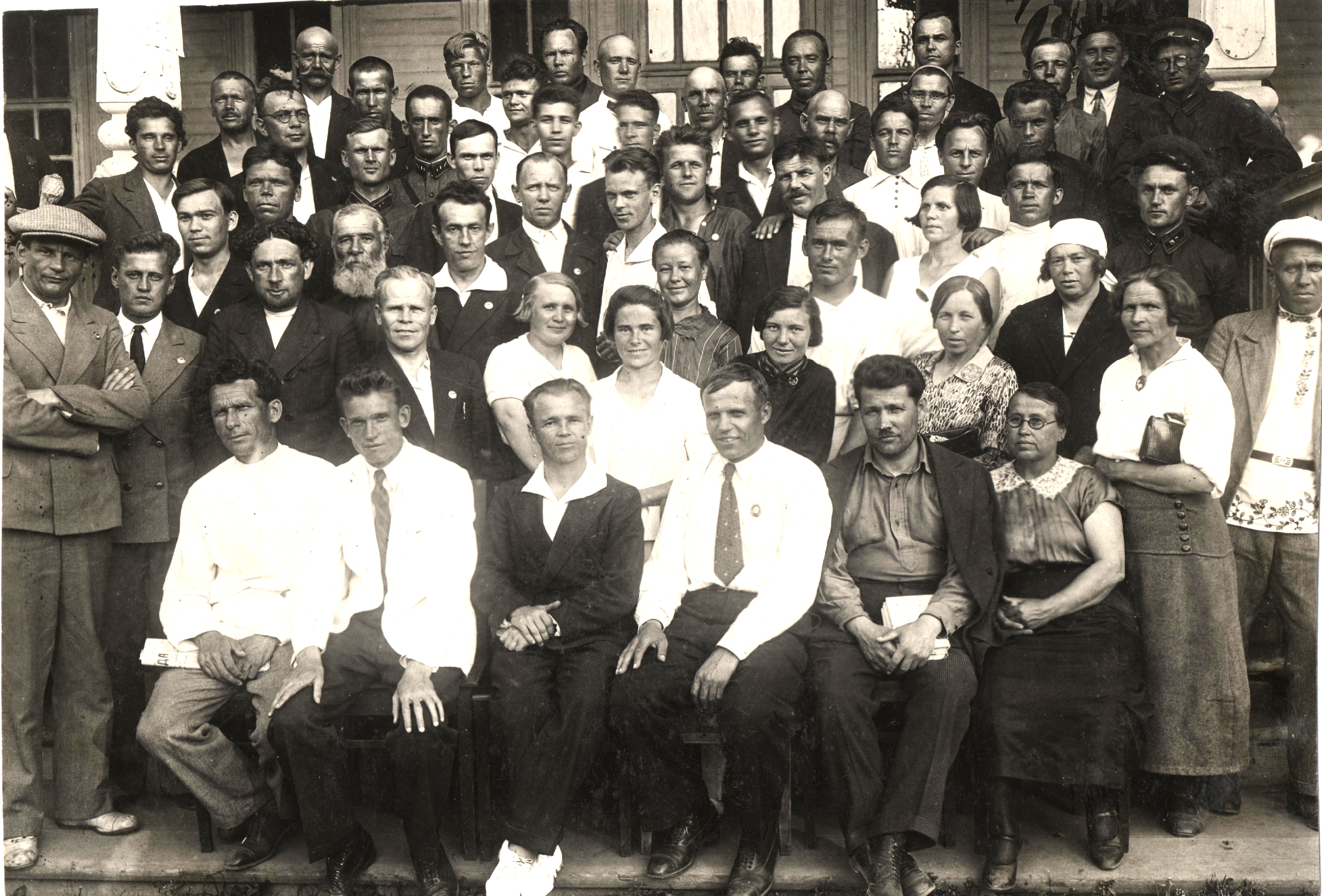 на снимке делегаты 1-го пленума Сталинского районного комитета ВКП (б) г. Перми состоявшегося 25.05.1936 года